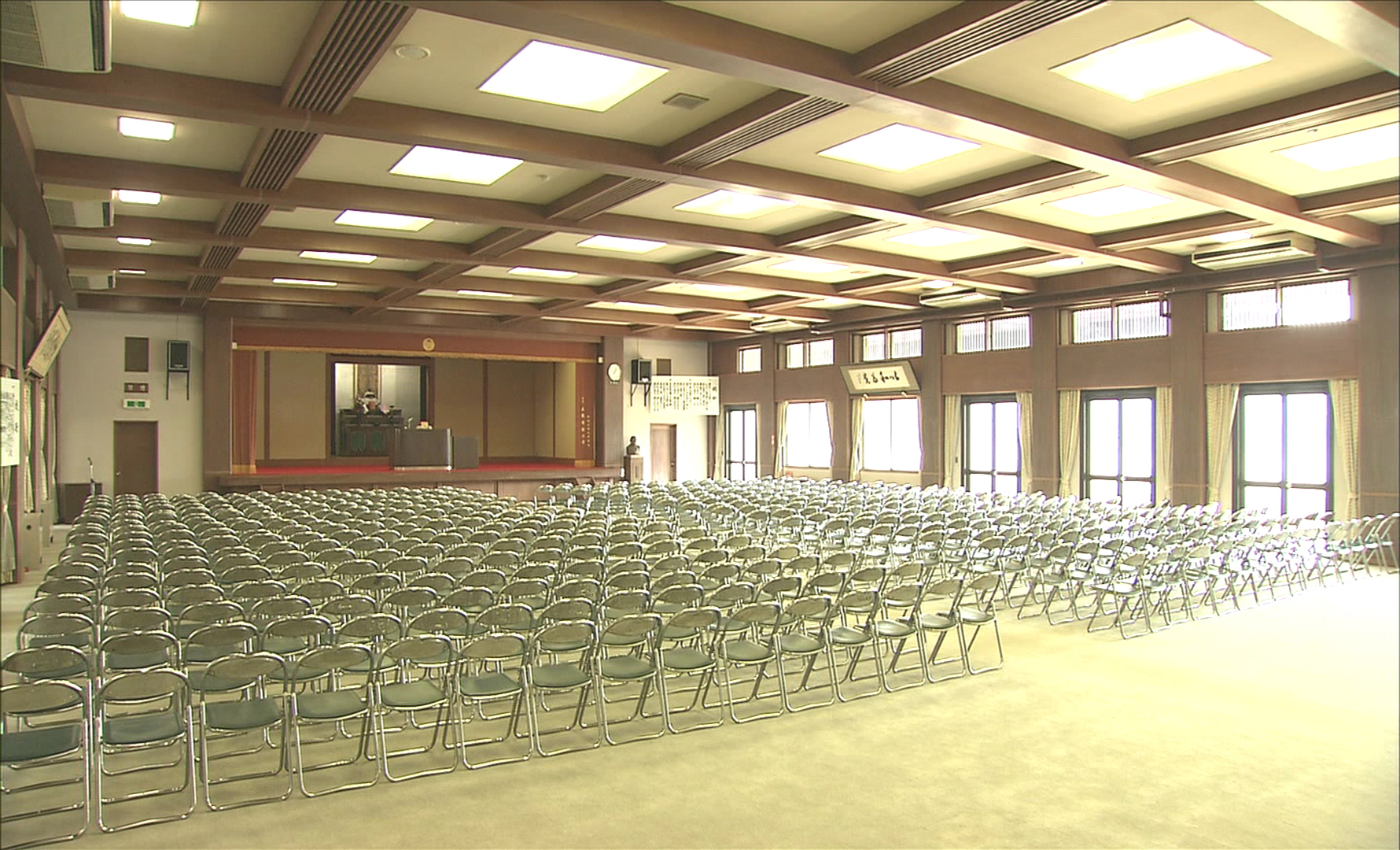 身延山大学講堂